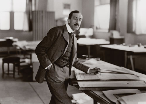 Henry Van de Velde (1863–1957)